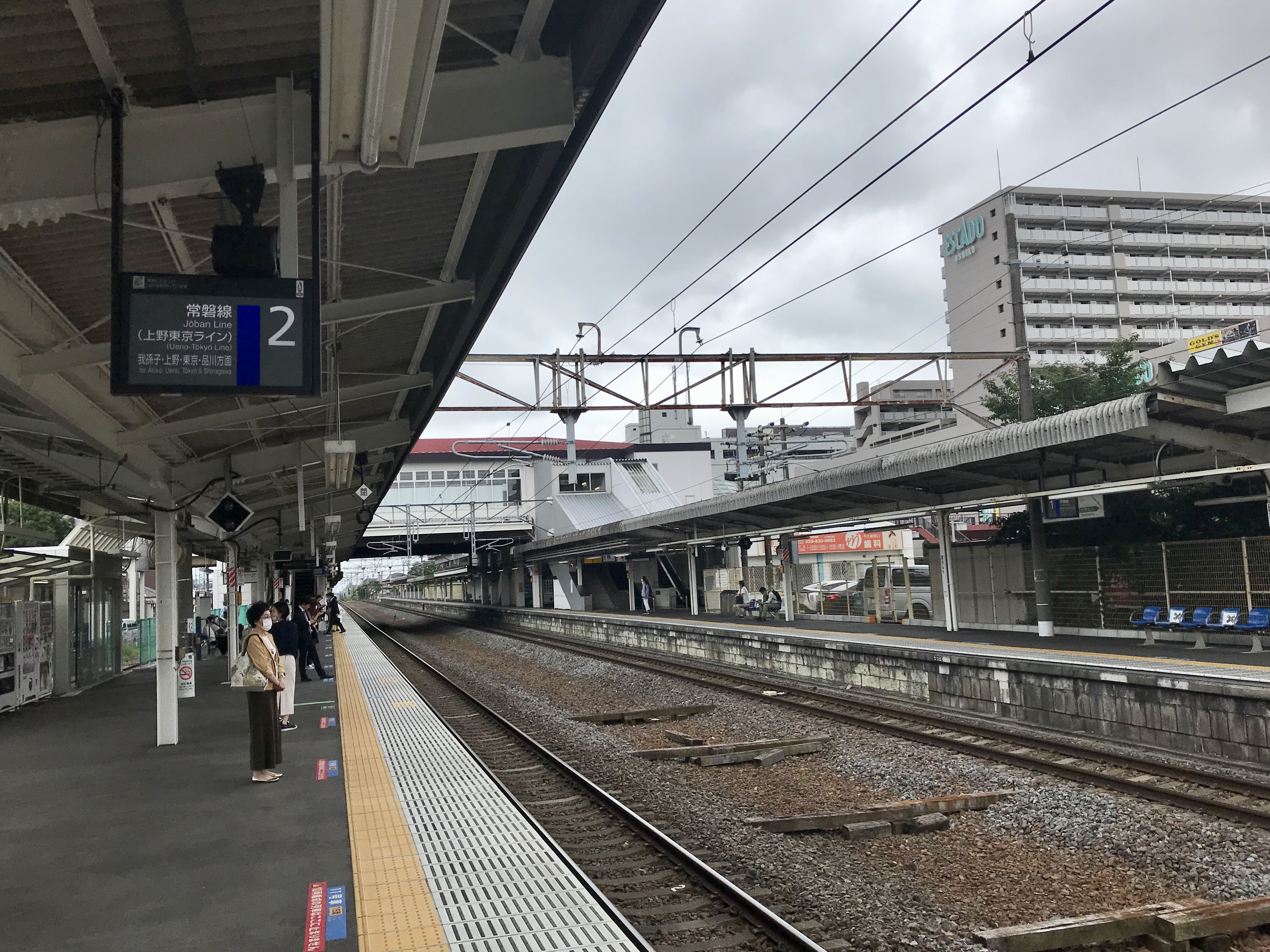 牛久駅ホーム